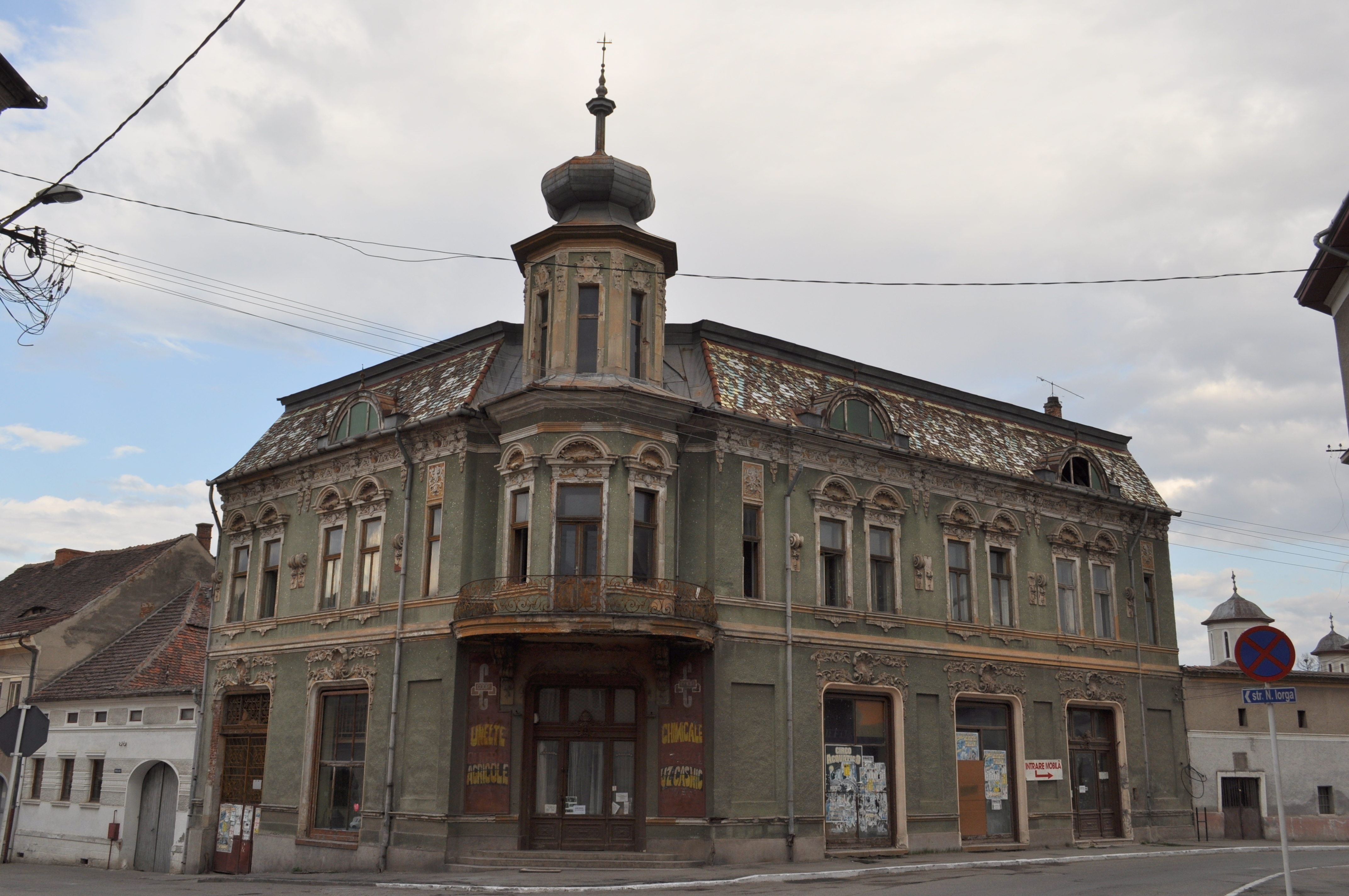 Ansamblul urban "Str. Nicolae Bălcescu" (detaliu: nr.1-3) 04